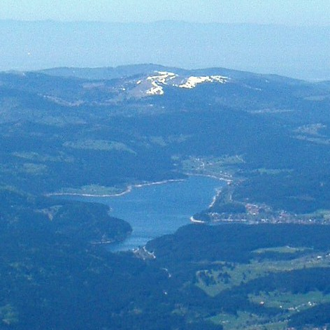 Der Schluchsee aus einem Flugzeug fotografiert; im Hintergrund der Feldberg mit Schneeresten